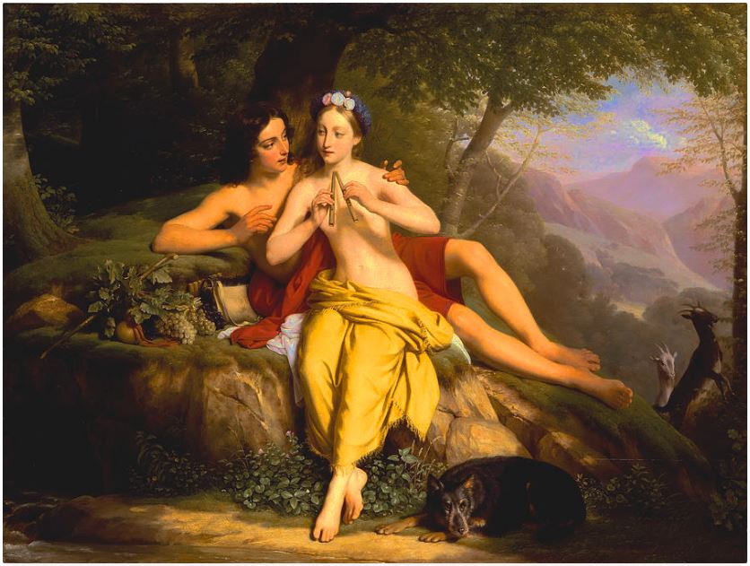 Daphnis et Chloe, profitant d'un pique-nique dans une campagne bucolique. Les chèvres en arrière-plan sont une référence au dieu Pan qui sauva Chloe lorsqu'elle fut kidnappée par des brigands d'une cité voisine. Huile sur toile de Louise Marie-Jeanne Hersent (1784-1862)